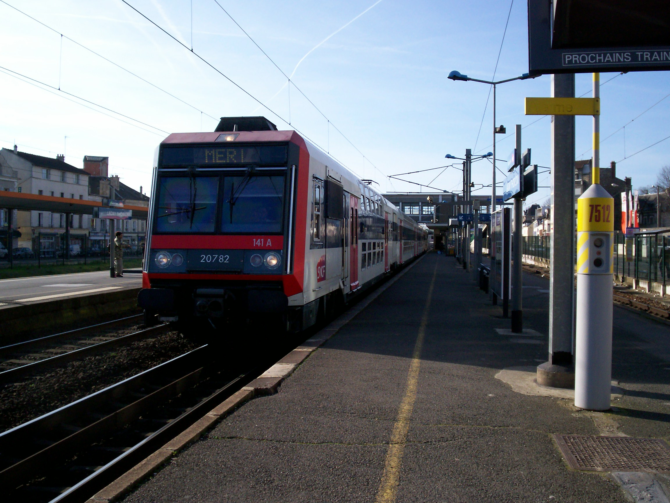 Rame Z 20500 arrivant à Lagny-Thorigny